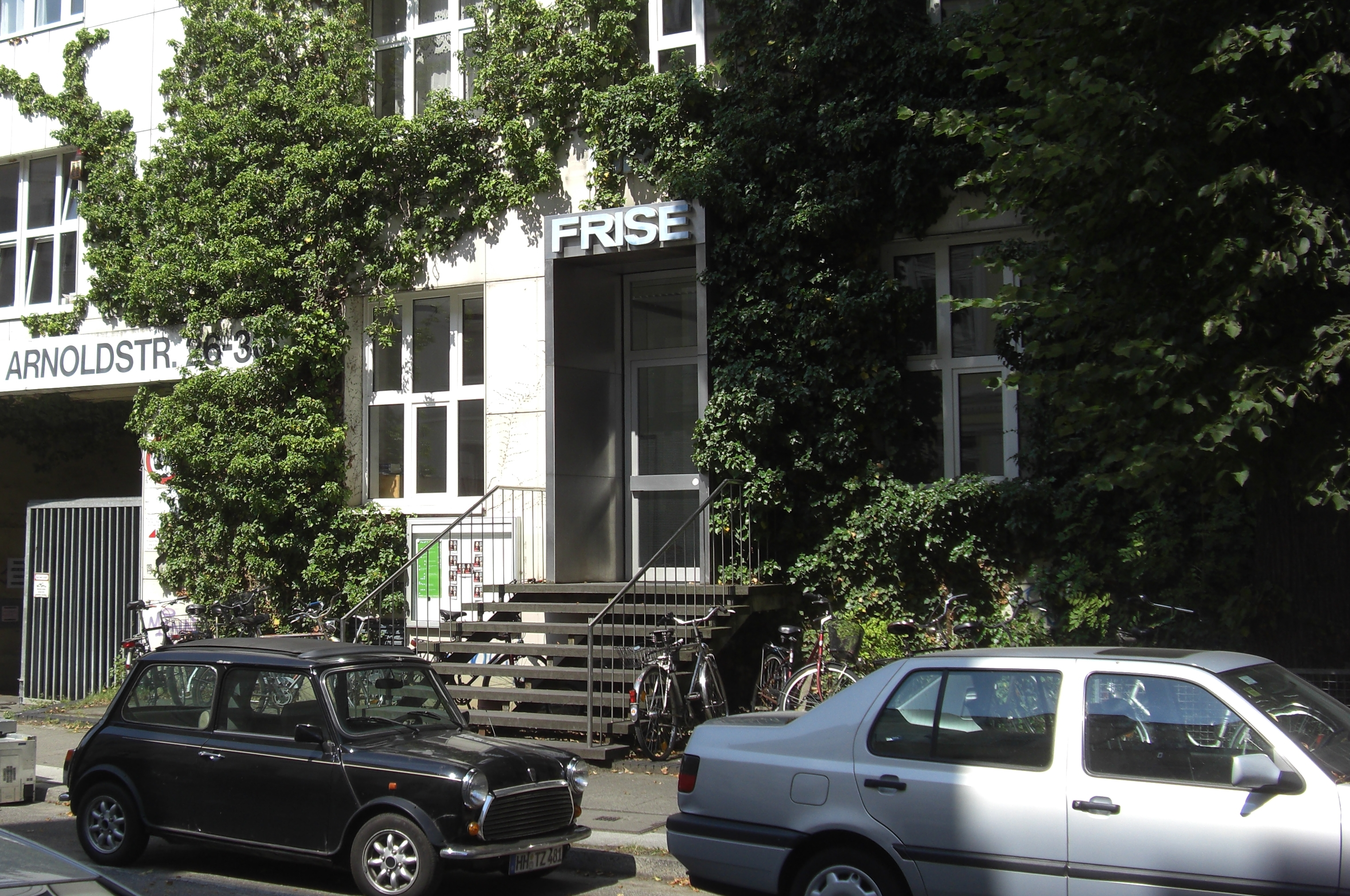 Die "Frise" in Ottensen, Atelier und Ausstellungsräume des Künstlerhaus Hamburg